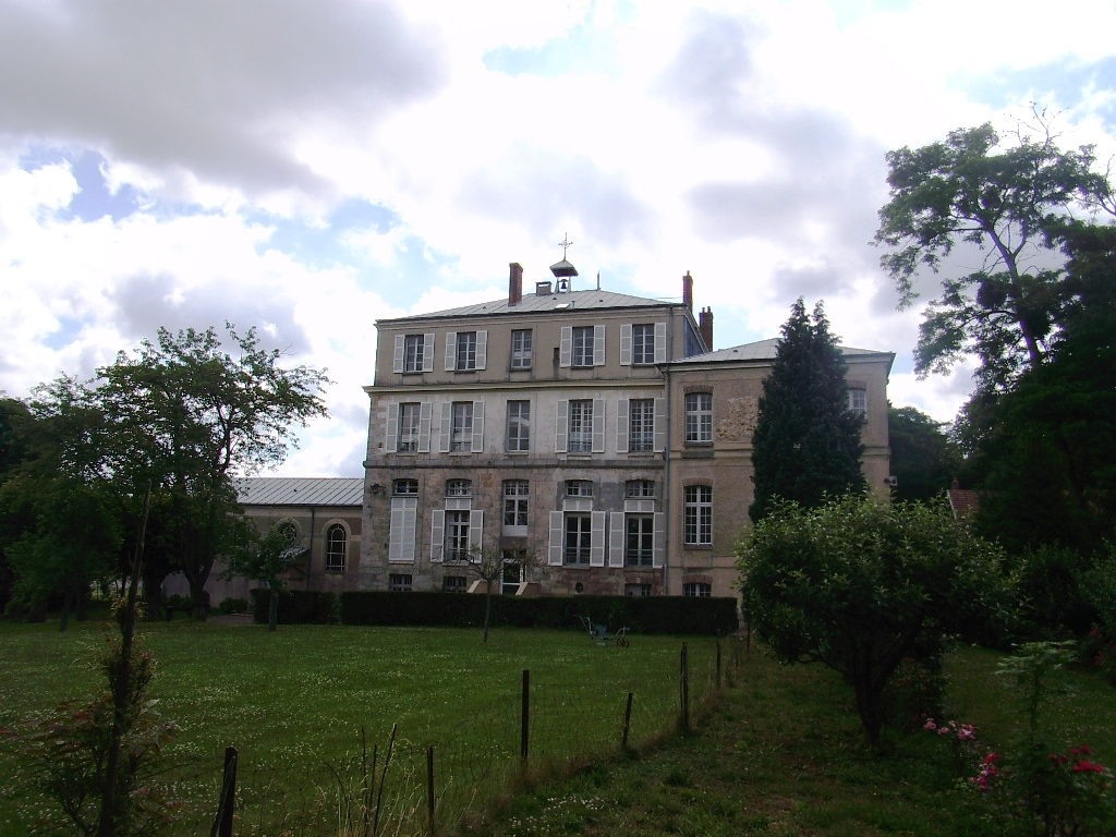 Château de Ballainvilliers (91)